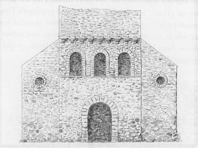 Proposition de restitution de la façade carolingienne de l'abbaye de Cormery